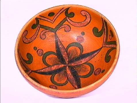 Ølbolle fra Rindal i Møre og Romsdal, nå på Norsk Folkemuseum i Oslo. NF.1927-1091